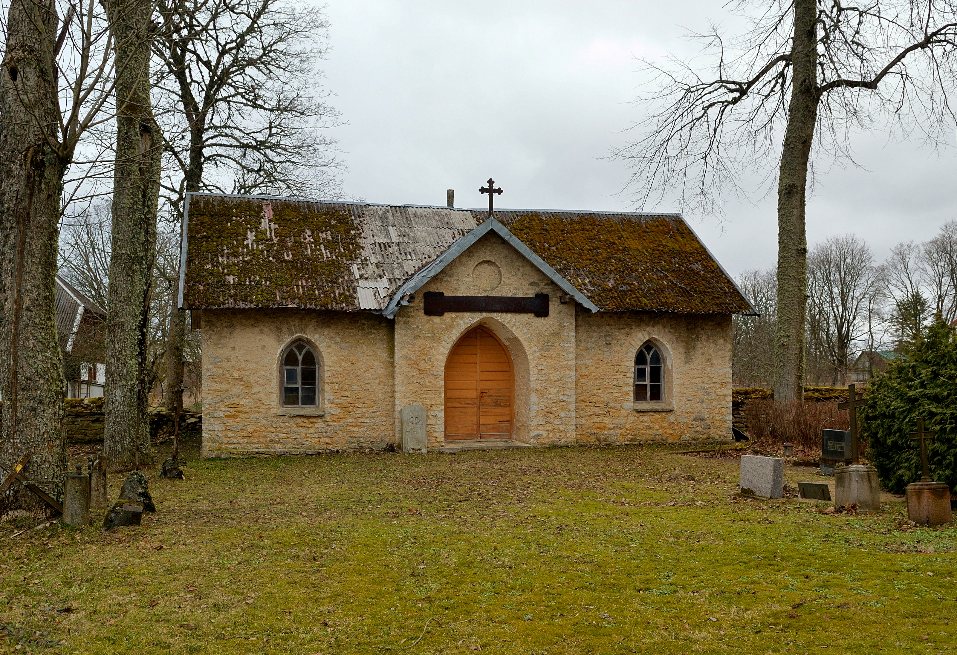 Simuna kirikuaia kabel